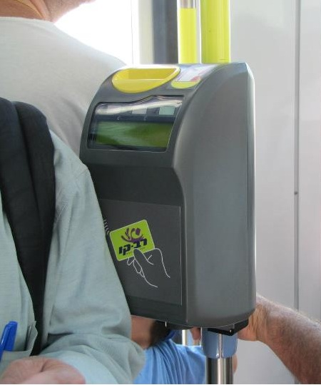 מכונת כרטוס/תיקוף של הרכבת הקלה בירושלים בתוך אחד מקרונותיה בעת נסיעה, המאפשרת החתמה של הכרטיס החד פעמי או תיקוף הנסיעה מתוך מצבור הרב-קו, שמשמש ככרטיס רב פעמי.